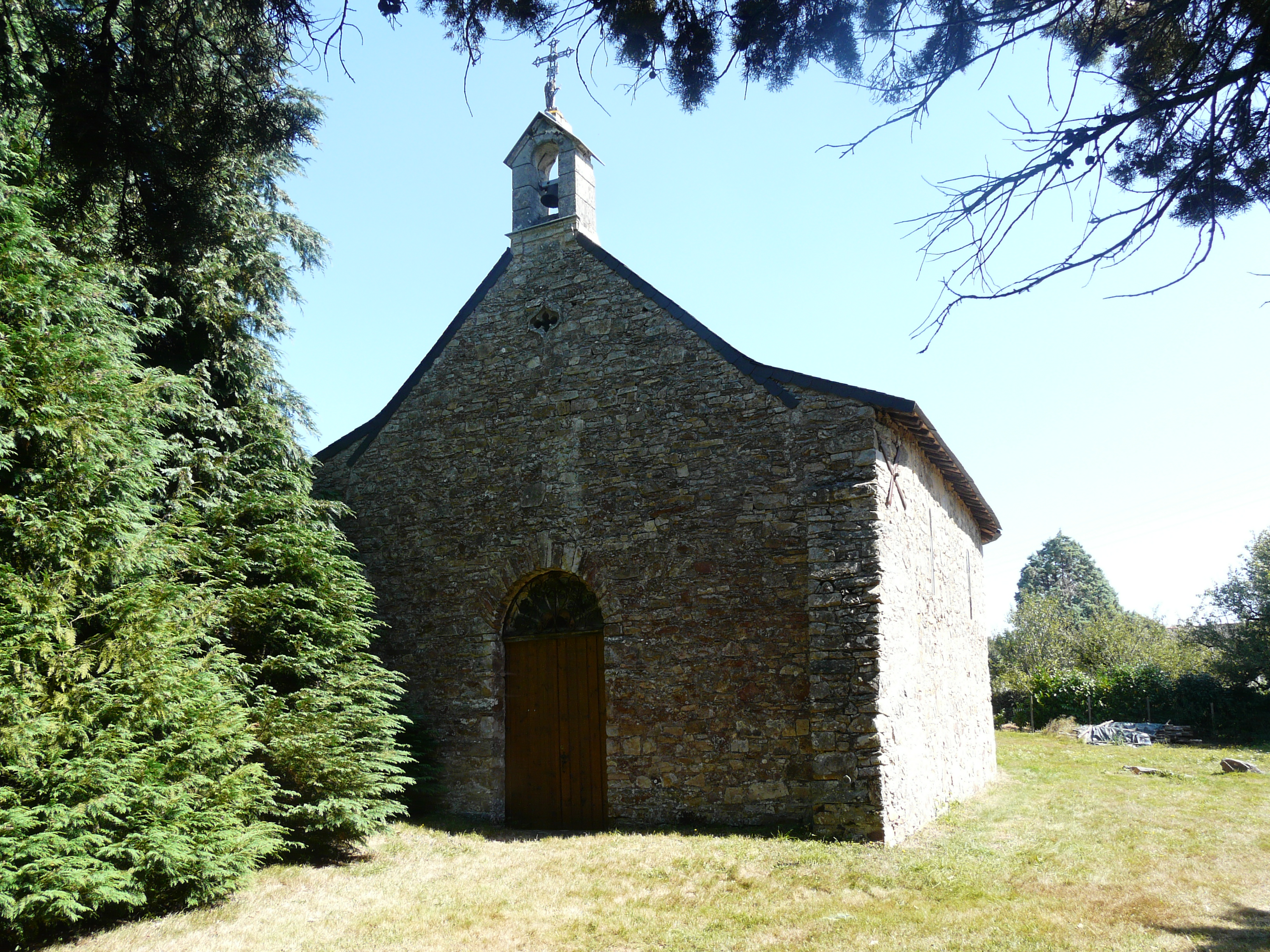 Chapelle du Dougilard (pignon nord)